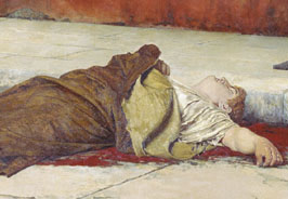 ВАСИЛИЙ СМИРНОВ. Смерть Нерона. 1888. Death of Nero